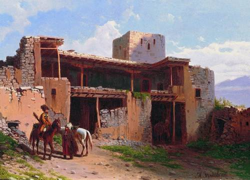 Сакля Шамиля. Этюд. Картон, масло. 25 x 34 см Дагестанский музей изобразительных искусств имени П.С. Гамзатовой